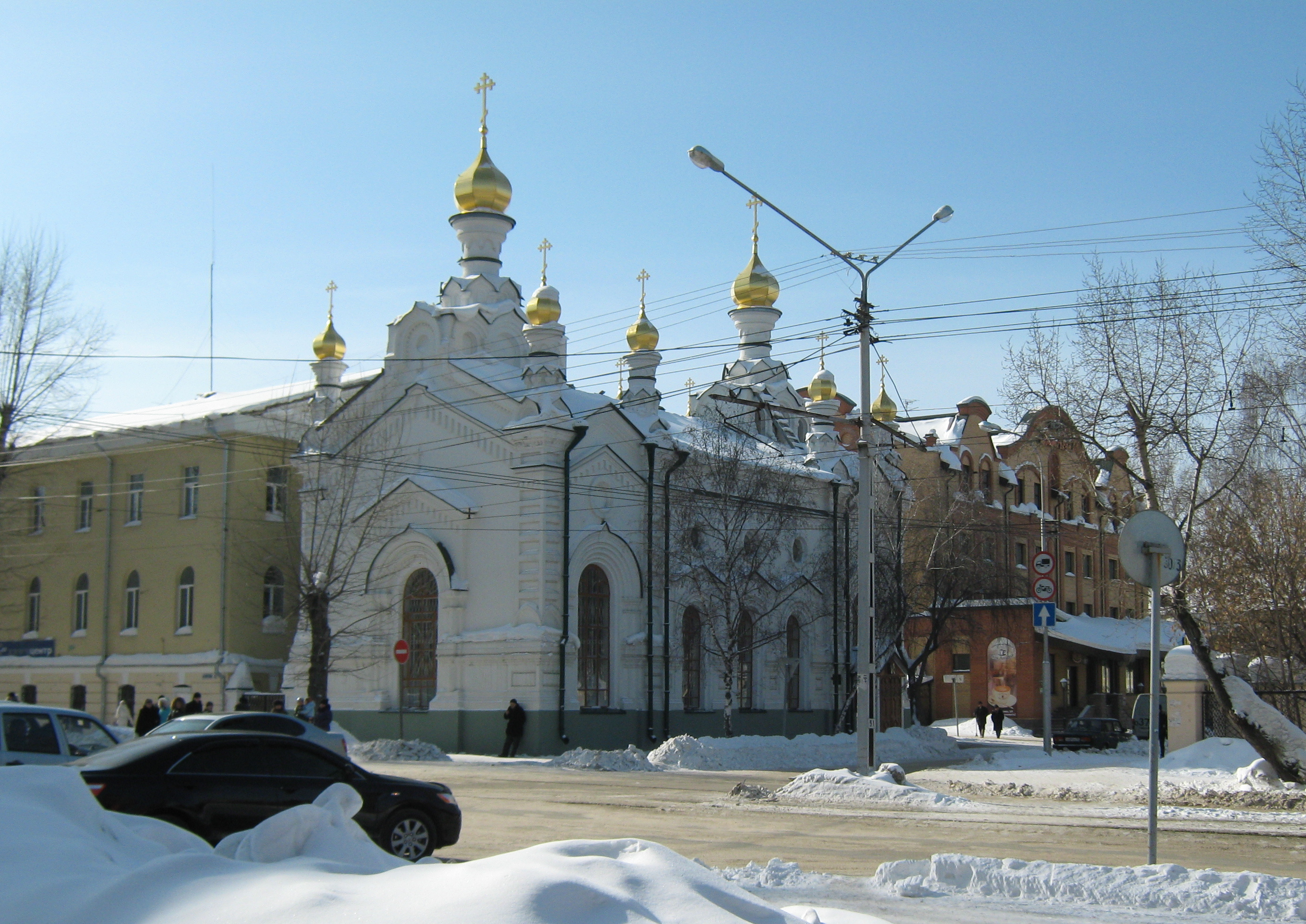 Томск. Арестантское отделение (слева) и тюремная церковь Александра Невского. Описание